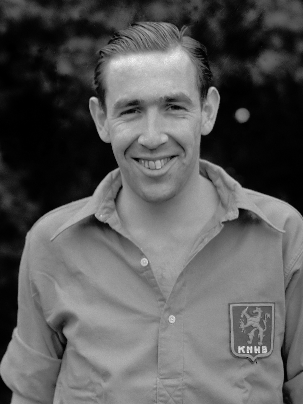 Hockey Nederland-Zwitserland. Leonard Wery 15 juni 1952